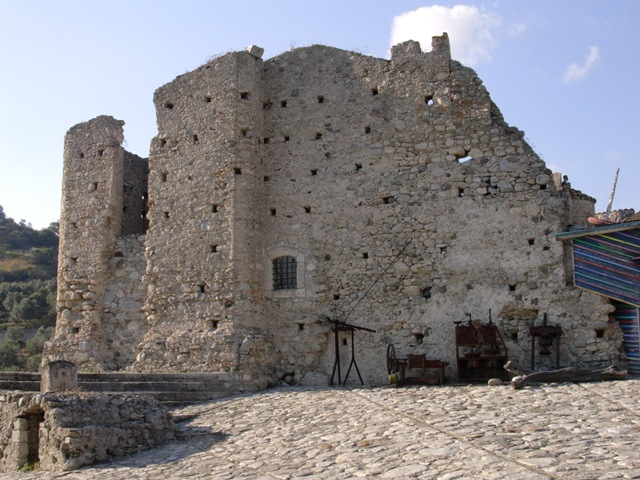 Autorizzazione OTRS # 2008022710009155 L'antico Monastero di Santa Barbara Sec. X